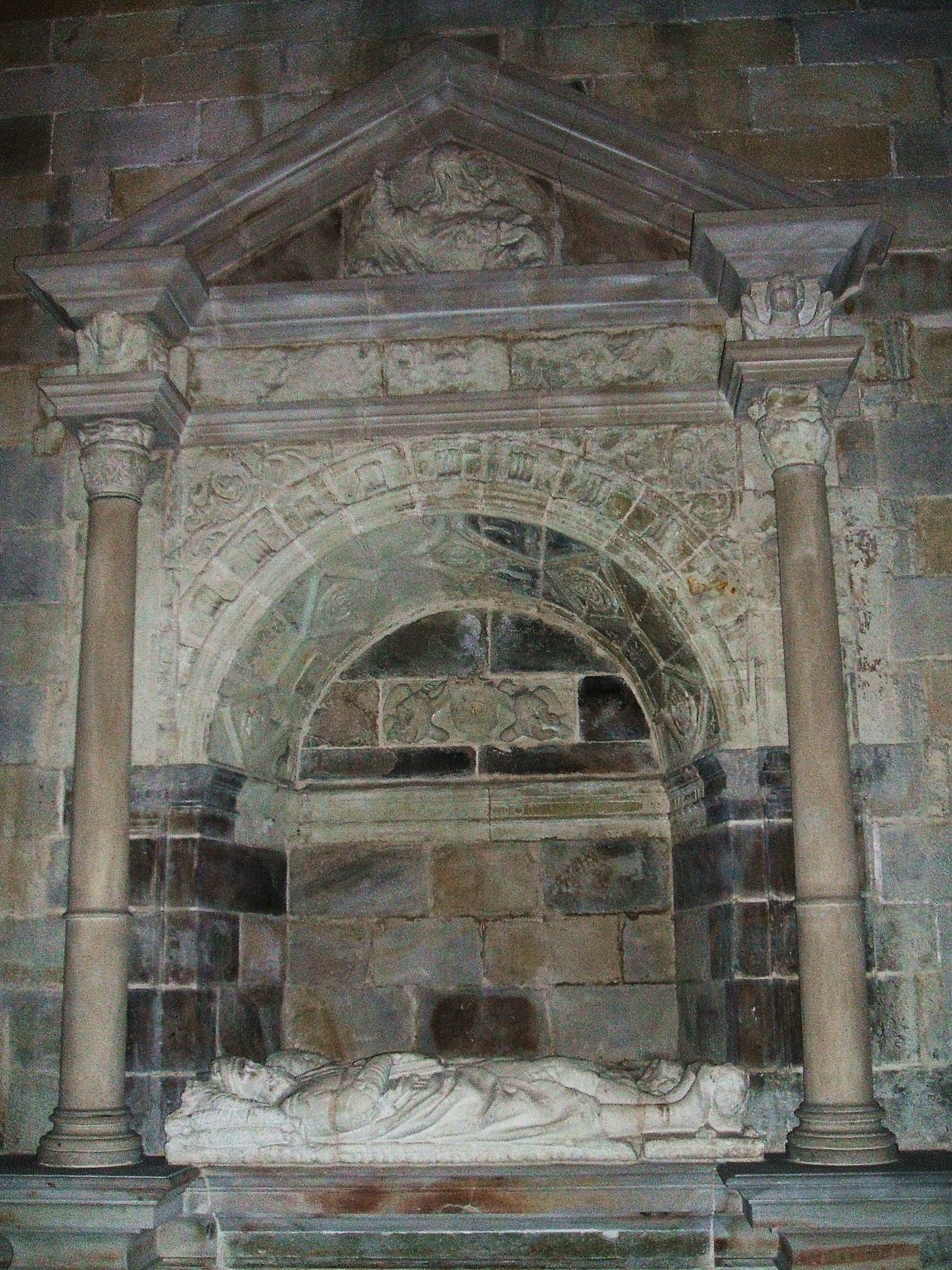 Sepulcro en la Capilla de los Salazar, Basílica de Santa María, Portugalete, Vizcaya, País Vasco, España